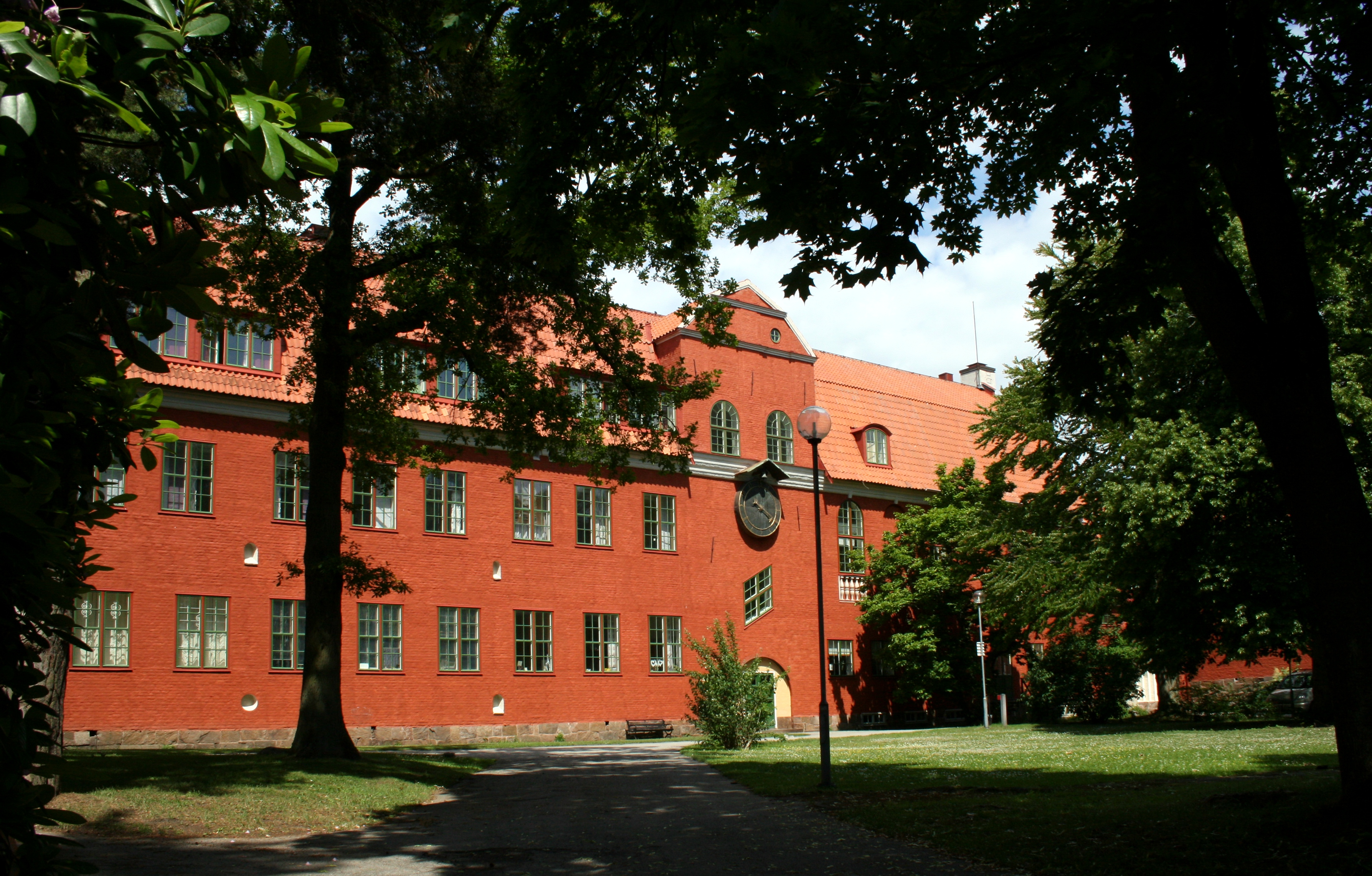 Väggaskolan i Karlshamn. Realskolebyggnaden